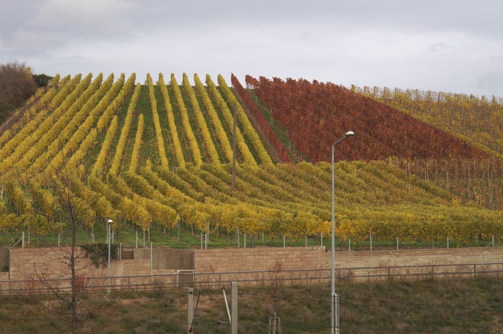 Die angrenzenden Weinberge geben dem Pragsattel im Herbst ein buntes Gesicht